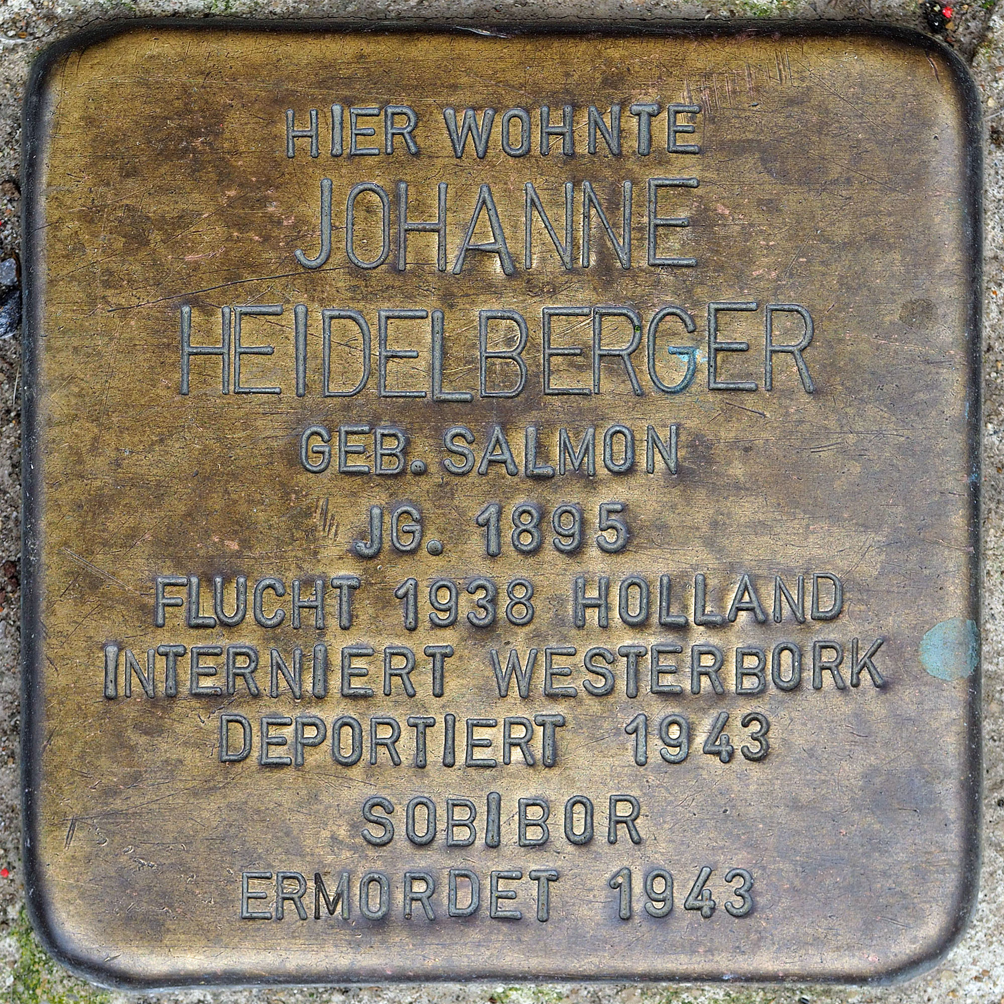 Stolpersteine MG: Heidelberger, Johanne